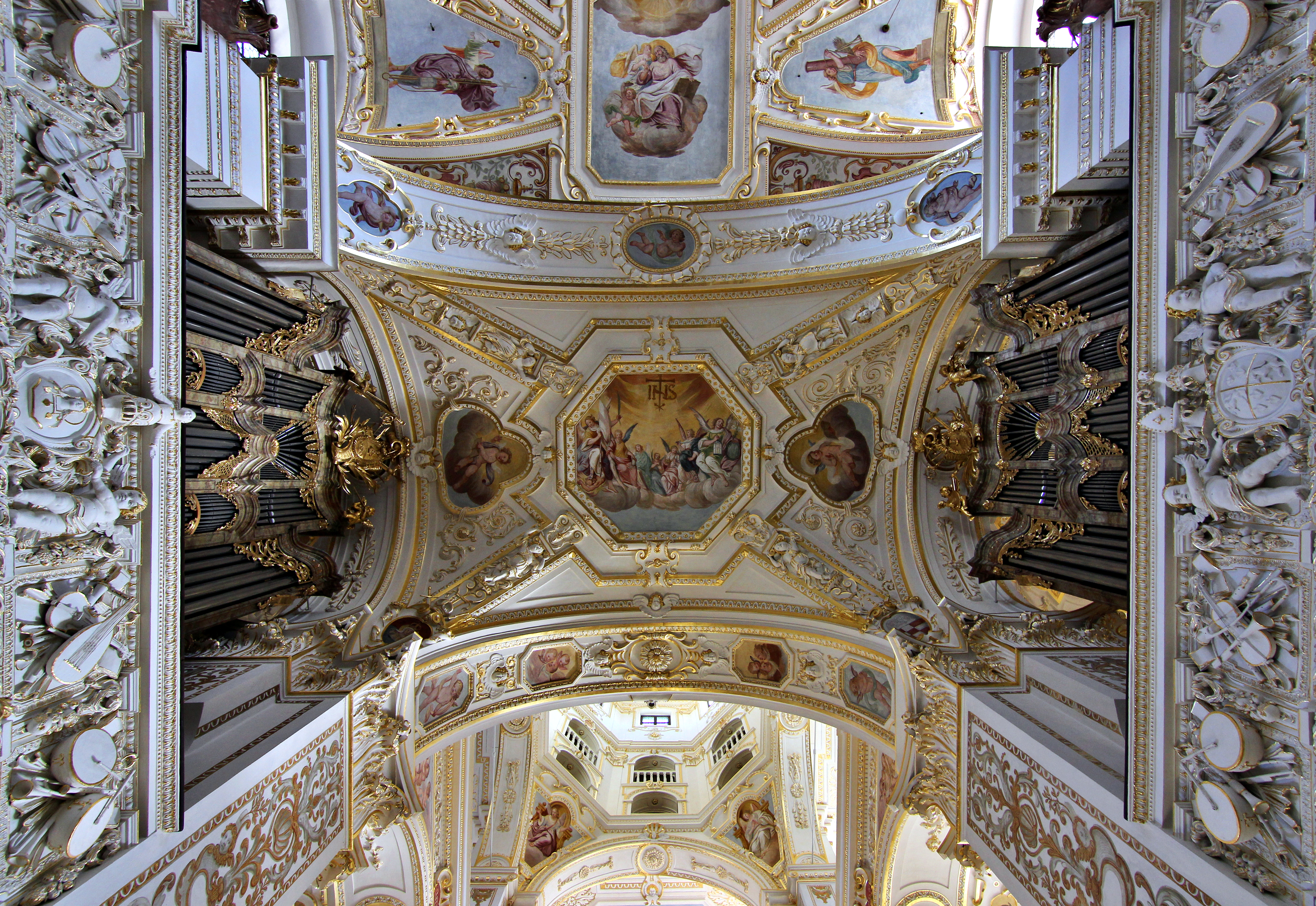 Dieser Bogen teilt in der Basilika St. Lorenz die Kirche in Kirchenschiff und Kirchenchor, Kempten